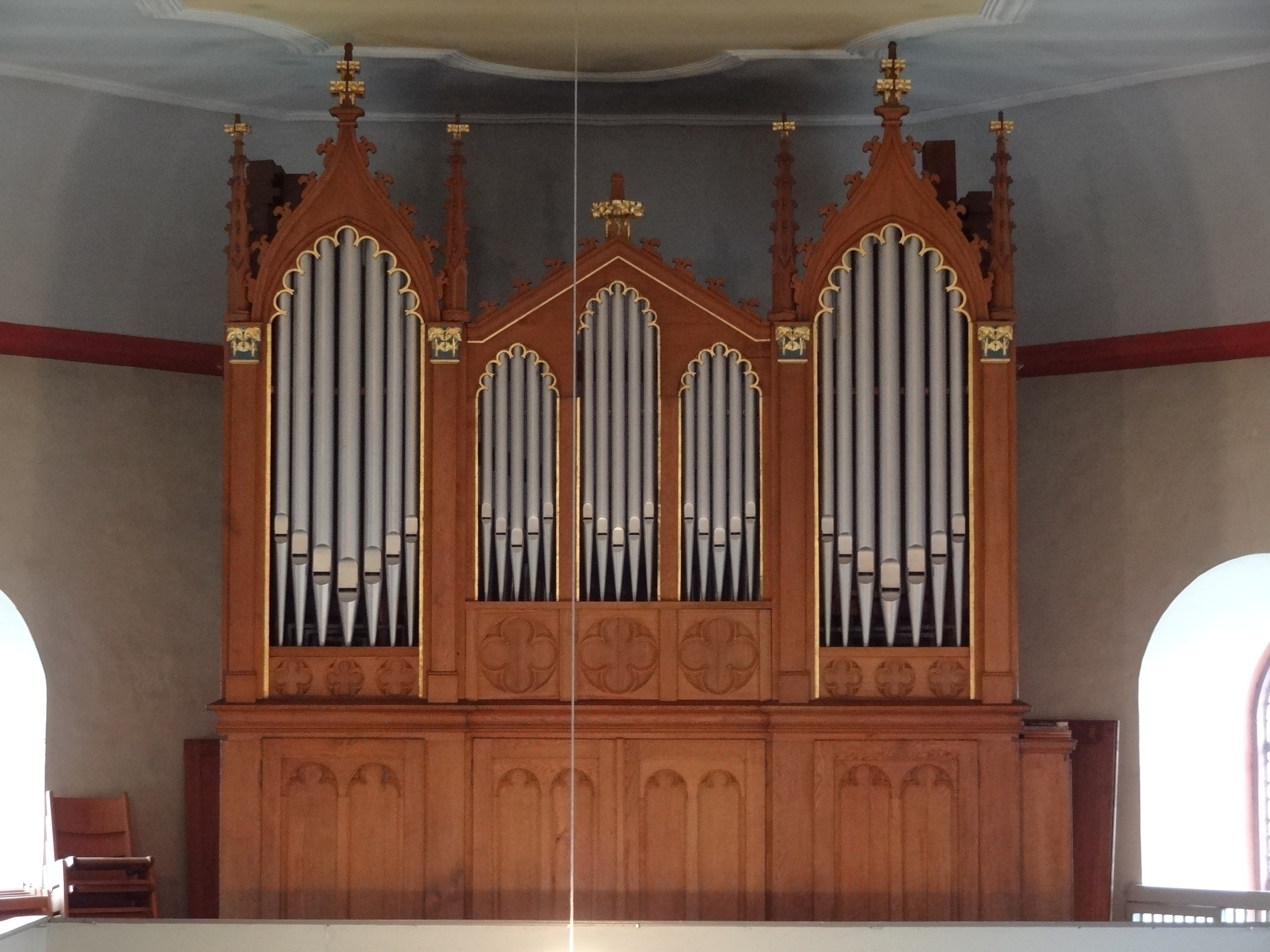 Evangelische Kirche (Fauerbach vor der Höhe)